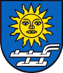 Wappen der politischen Gemeinde Känerkinden, Schweiz